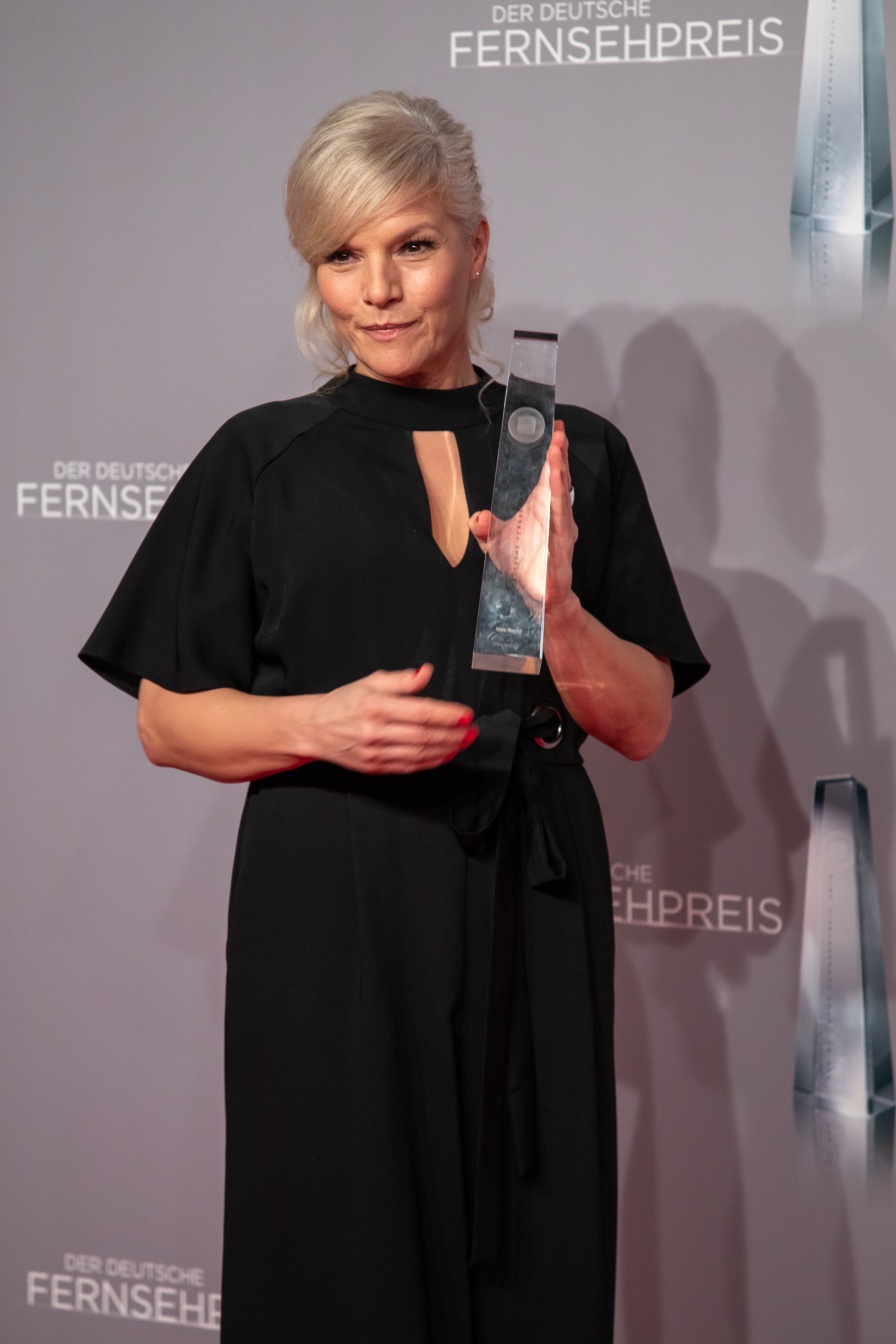 Ina Müller beim Deutschen Fernsehpreis 2019 in der Düsseldorfer Rheinterrasse